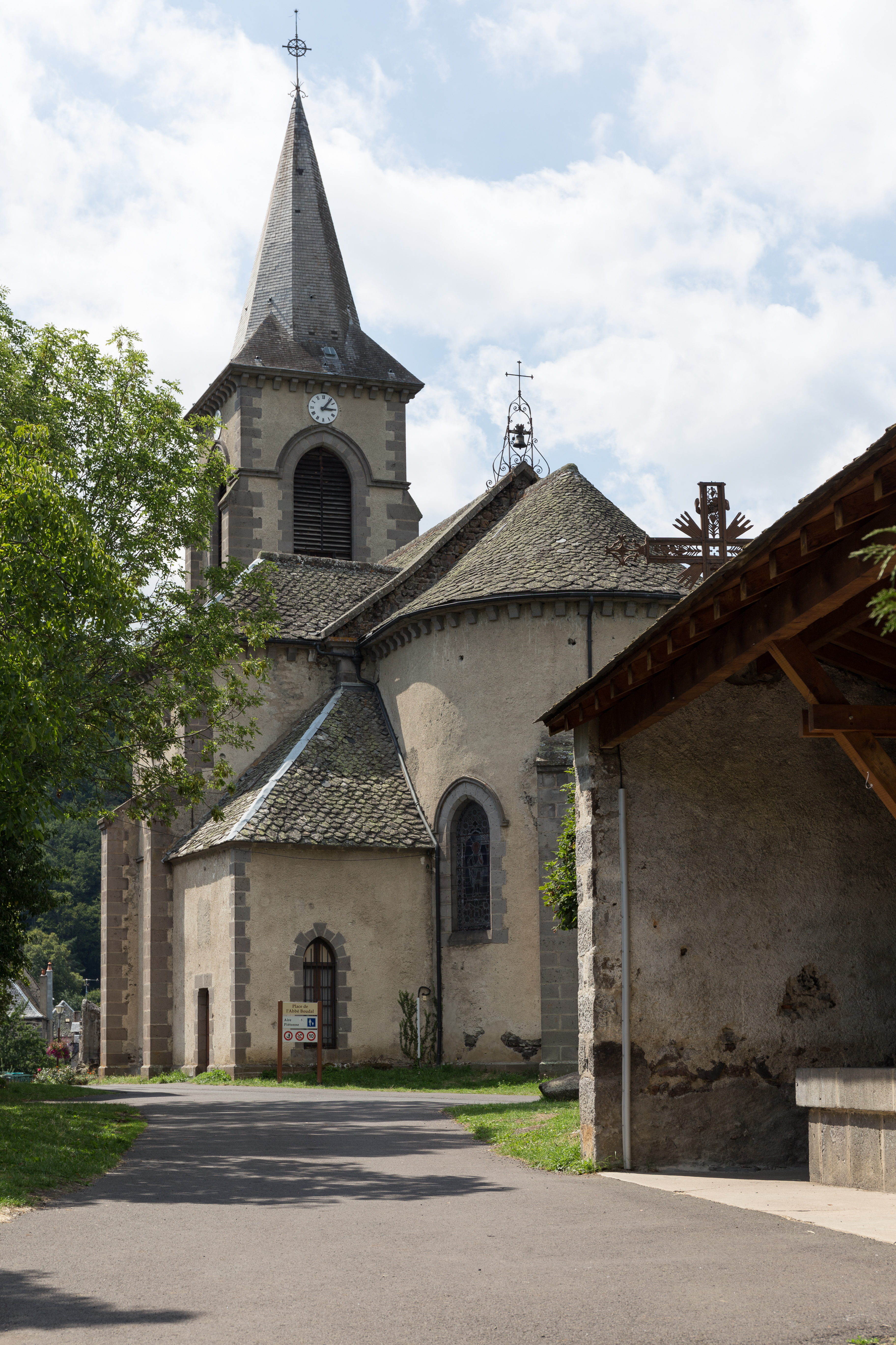 Église Saint-Ferréol de Murol : l'abside. .